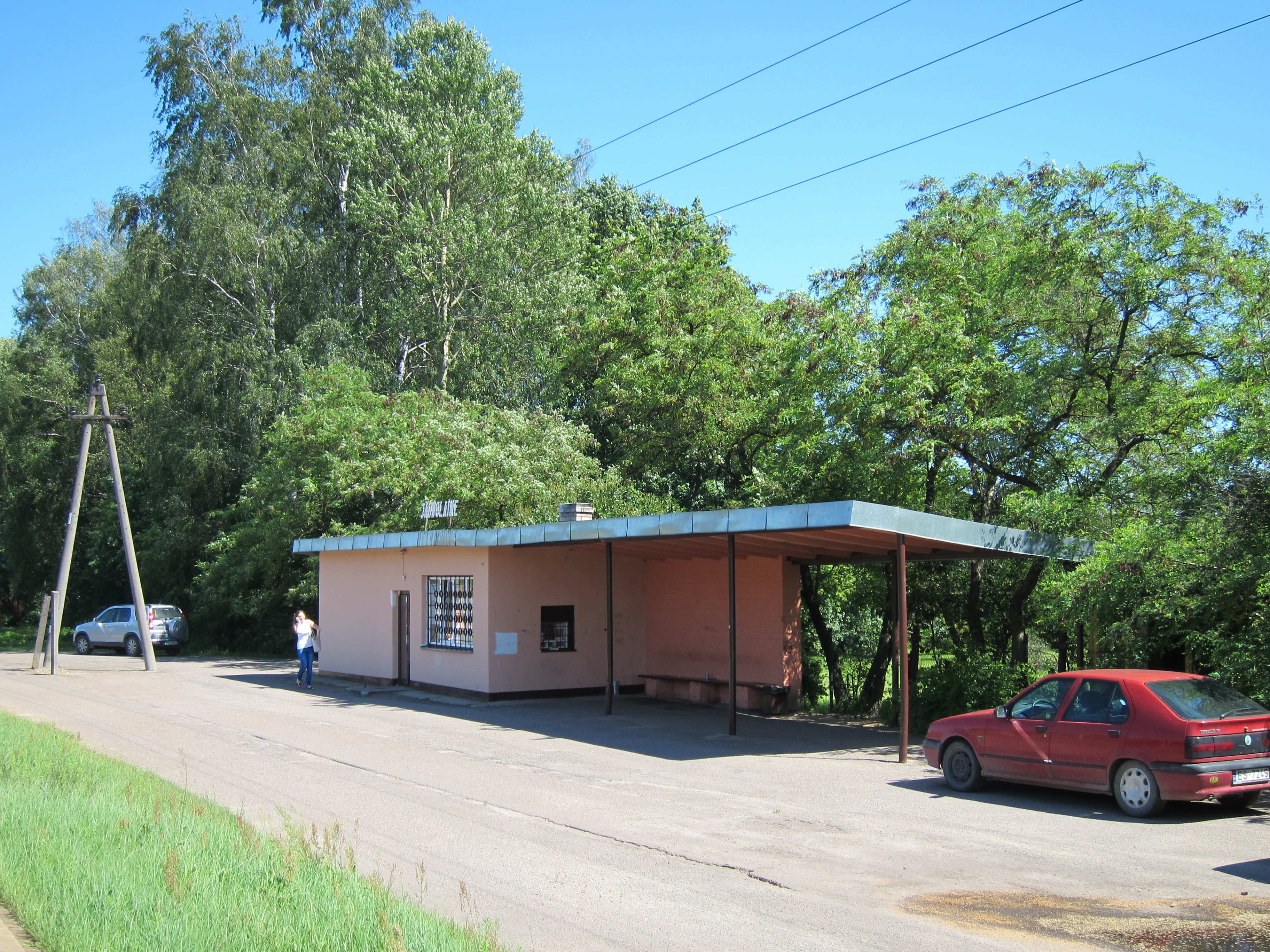 Jaunolaines stacijas ēka.